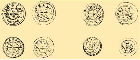 Koloman - denáry